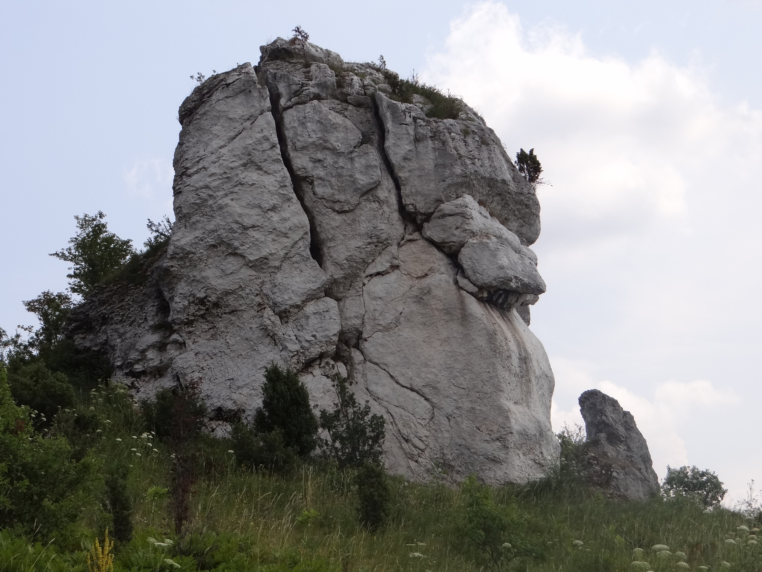 Skała Szafa w Grupie Dziewicy koło Olsztyna